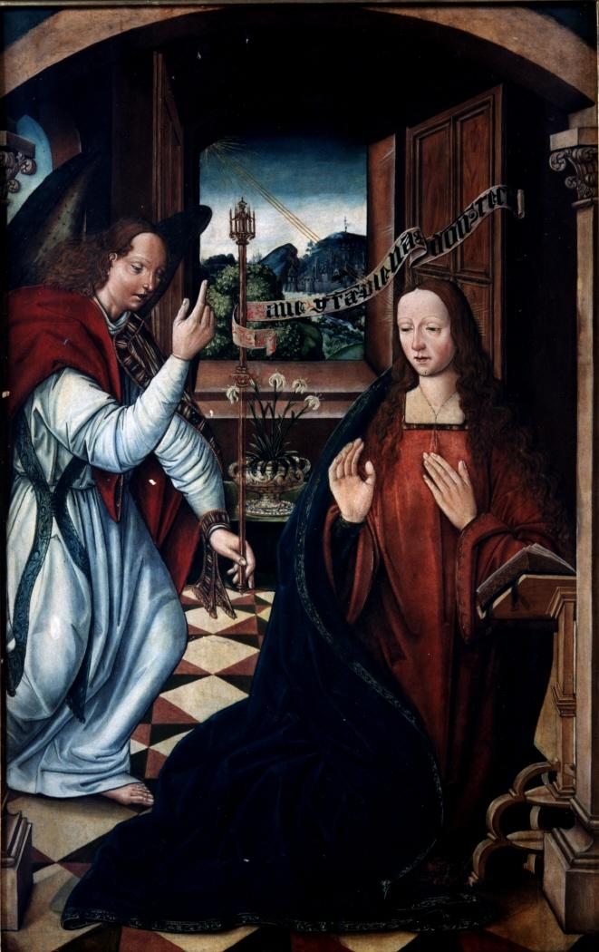 La obra representa el momento en que el arcángel San Gabriel anunció a la Virgen María que sería la madre del Mesías.